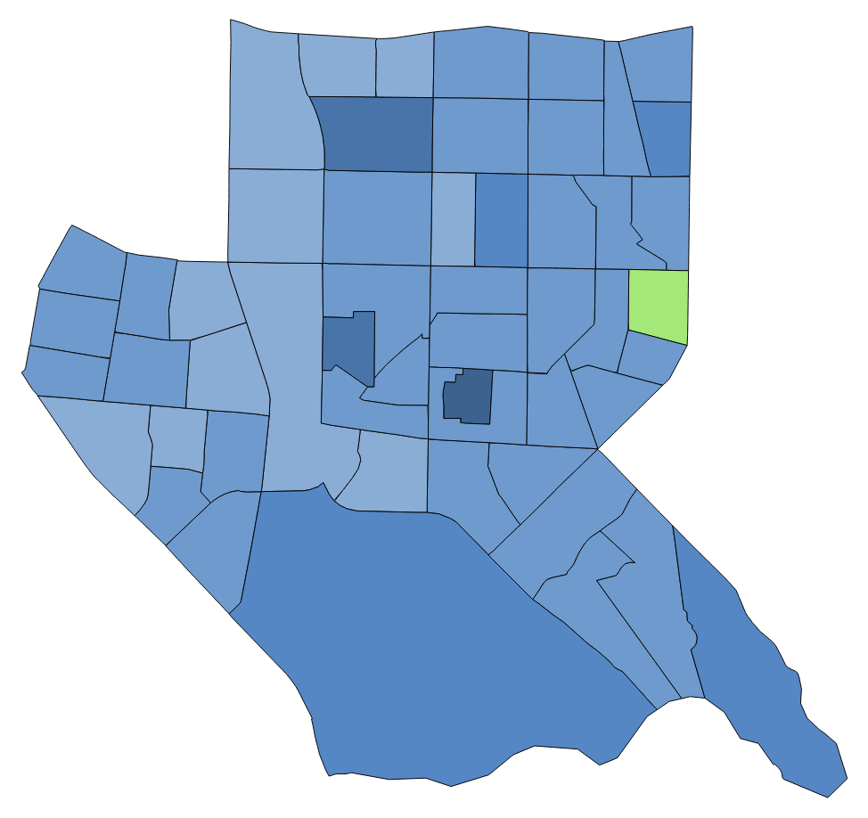 顏色對照表